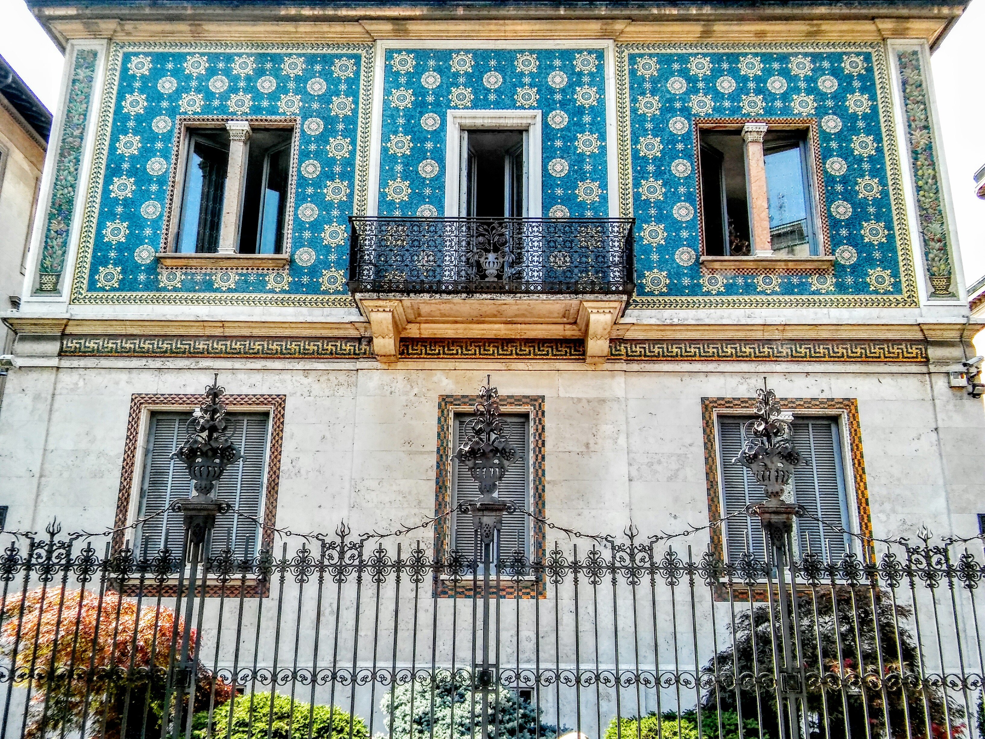 Milano, villino Maria Luisa in via Pietro Tamburini 8, costruito nel 1906 su progetto di R. Cusini.Fonte: Maurizio Boriani, Corinna Morandi, Augusto Rossari, Milano contemporanea. Itinerari di architettura e di urbanistica, Maggioli Editore, 2007, p. 120. ISBN 978-88387-4147-6 Invalid ISBN.